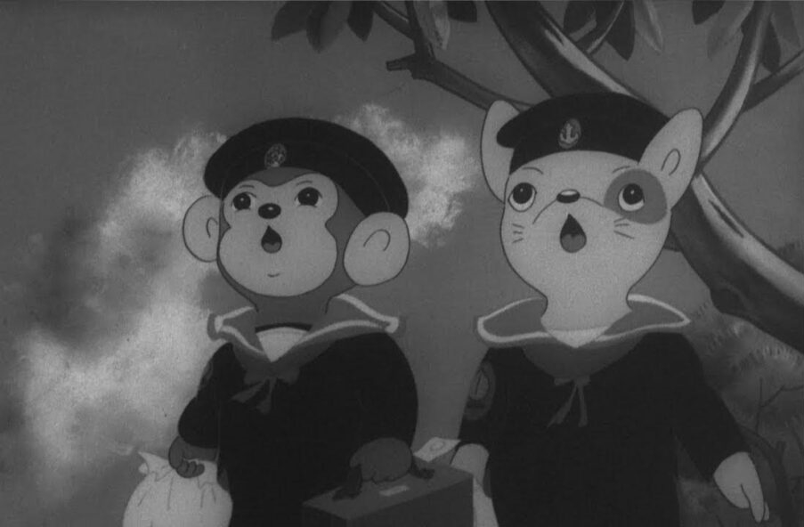 (Español:) Este archivo es de dominio público porque en julio del 2006, una corte japonés mando que todas las películas producidas antes de 1953, son aptas para el dominio público. (English:) This file is in the public domain because in July 2006, a Japanese court ordered all films produced before 1953, are eligible for the public domain. [1]